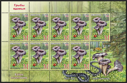 Лісічка шэрая